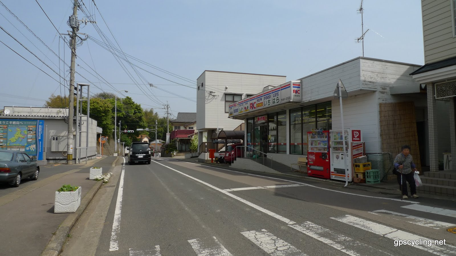 鷹島町中通免